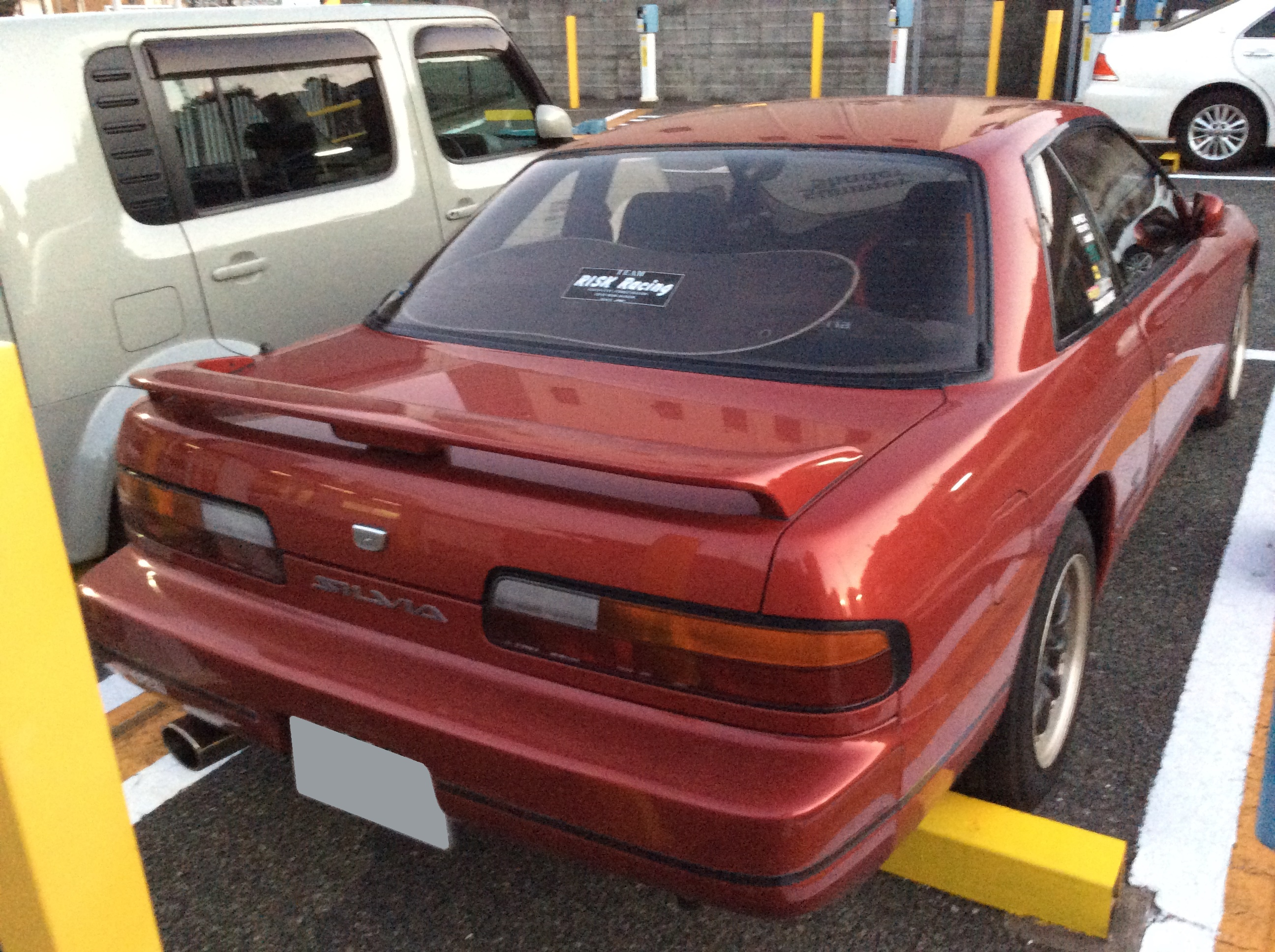 S13型日産・シルビアK'sをリアから撮影。